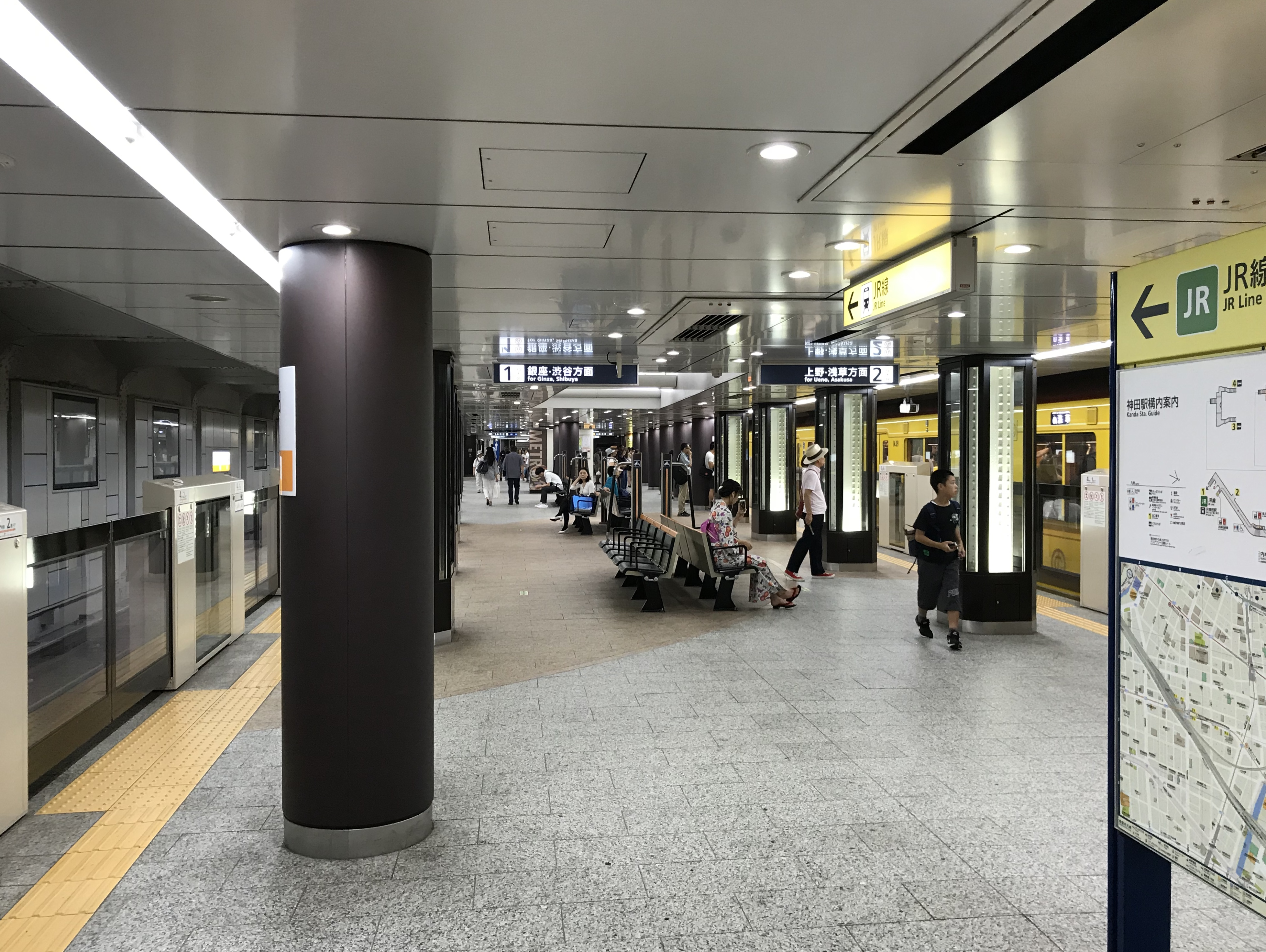 東京メトロ銀座線神田駅プラットホーム